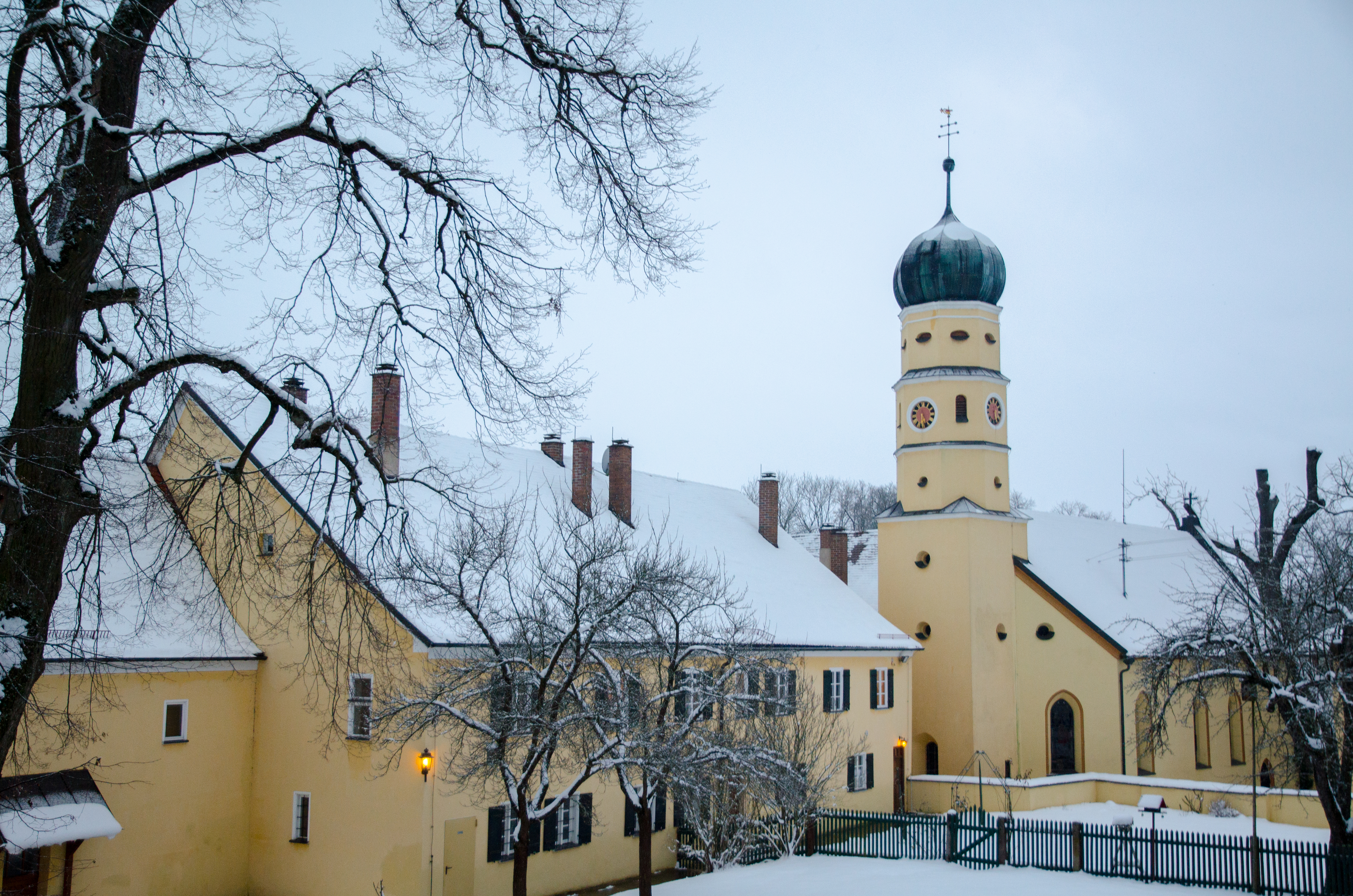 Wallerstein, Herrenstraße 78